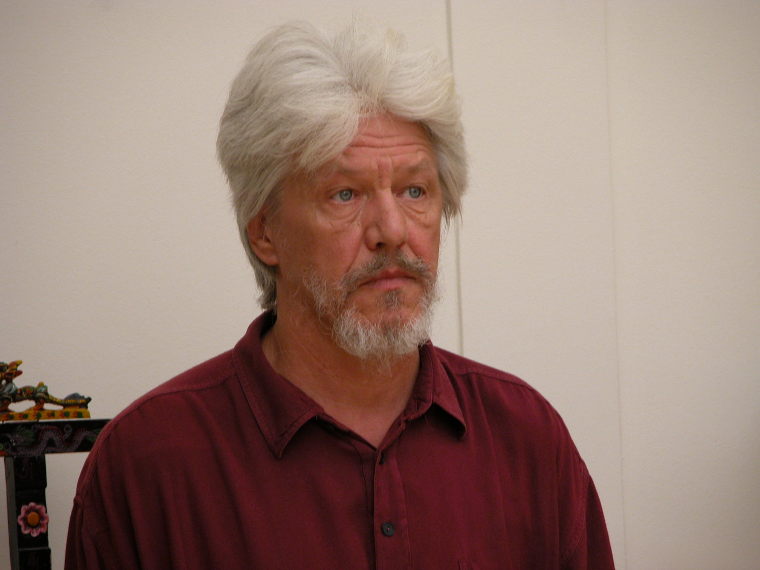 Mireisz László filozófus, a magyarországi buddhizmus képviselője